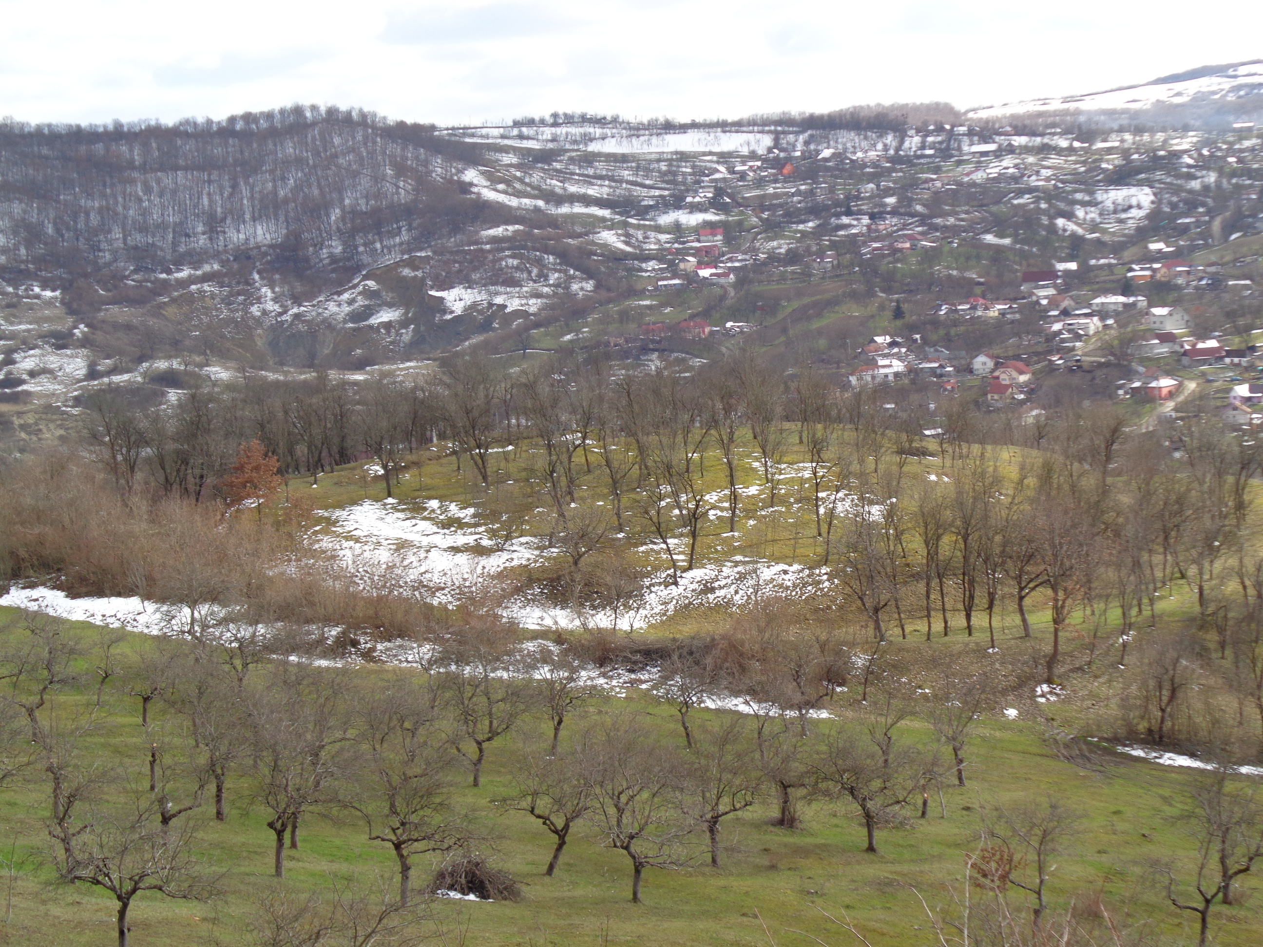 Așezare fortificată